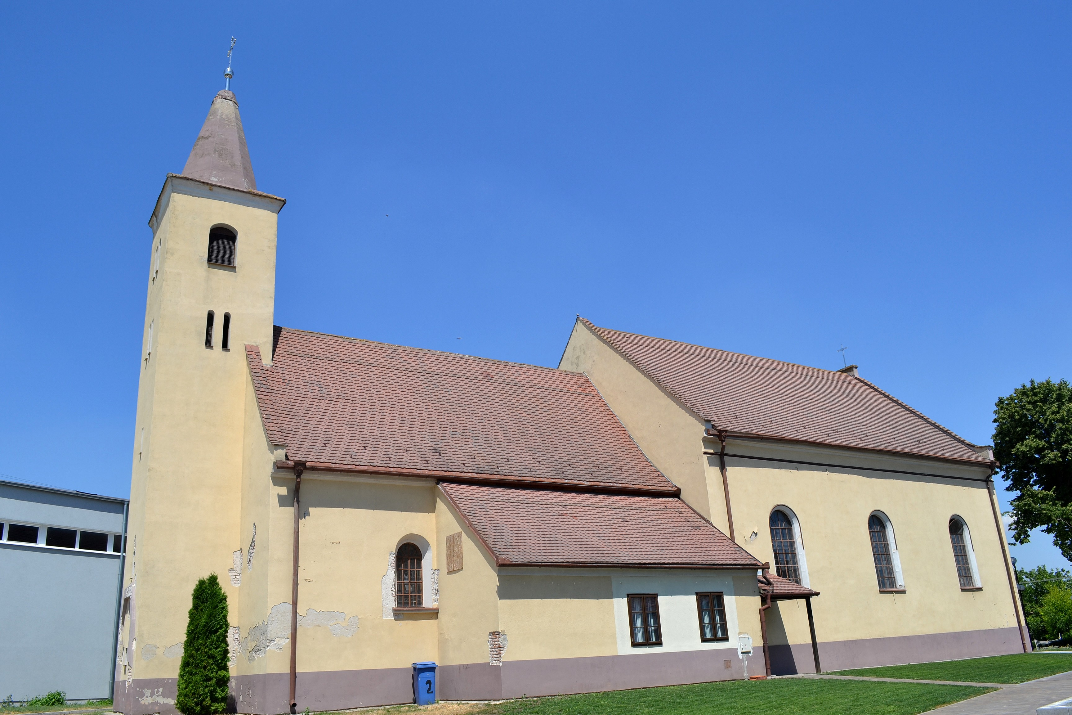 Ružindol (okr. Trnava), Kostol svätého Bartolomeja; celkový pohľad